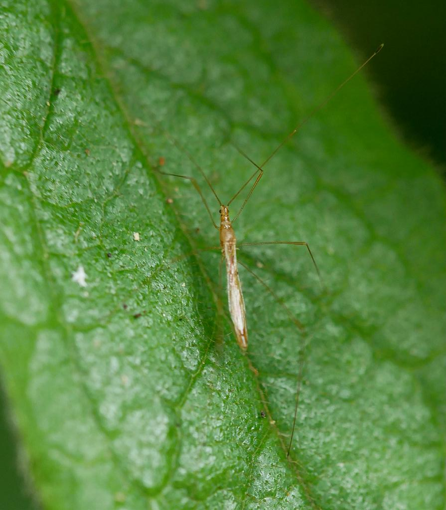 2019/08/06 和歌山県田辺市：Tanabe City. Wakayama Pref. Japan